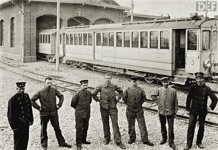 Straßenbahn Schaffhausen-Schleitheim (StSS): Das Personal von Depot und Werkstatt der StSS in Siblingen in den Anfängen des Bahnbetriebs um 1905, dahinter Personen-/Gepäcktriebwagen CFe 4/4 Nr. 3.